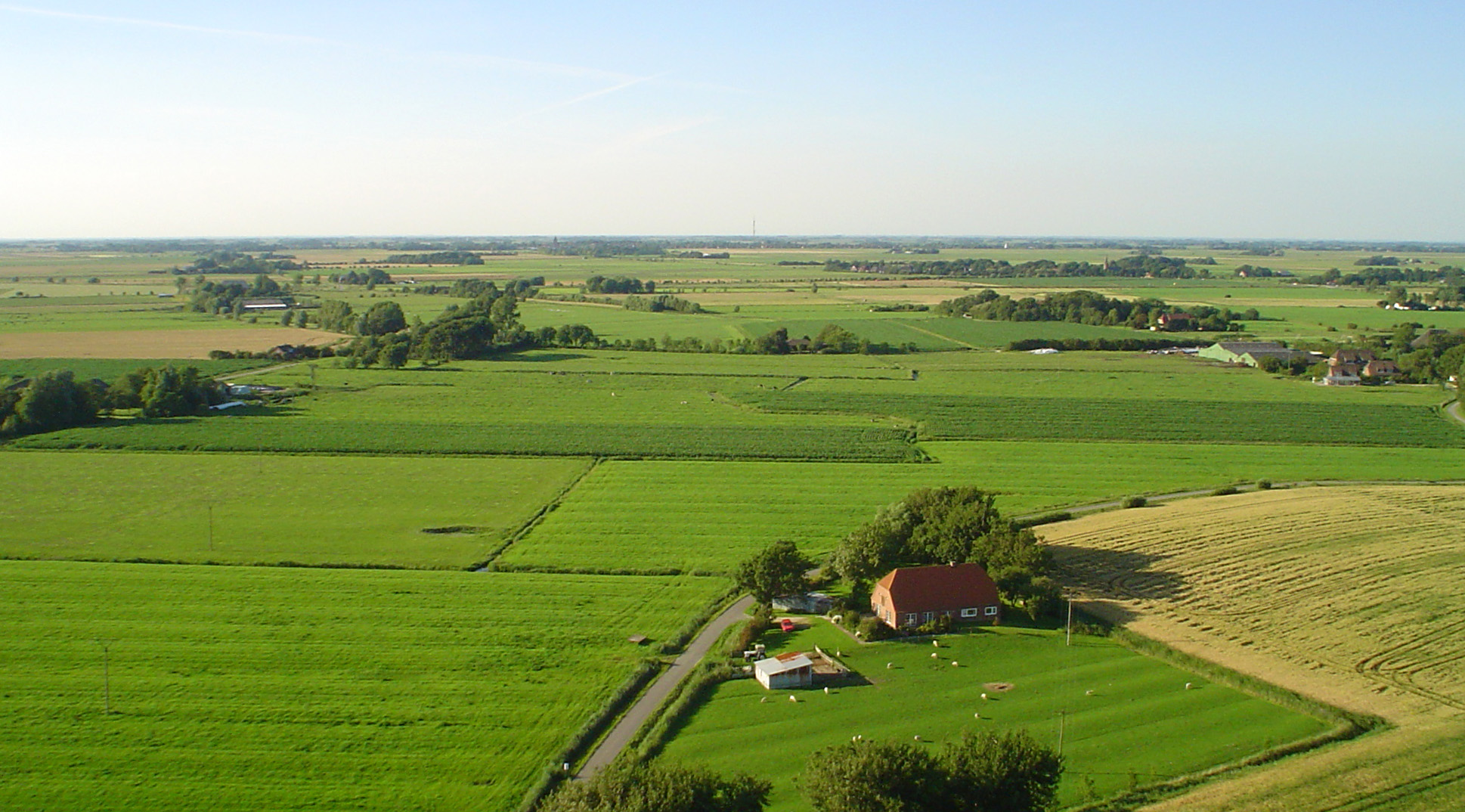 Außengebiet der Gemeinde Vollerwiek auf der Halbinsel Eiderstedt.